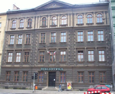 Poznań, ul. Święty Marcin 65 - dawna szkoła powszechna, do poł. 2012 r. filia Biblioteki Raczyńskich, obecnie własność miasta Poznania